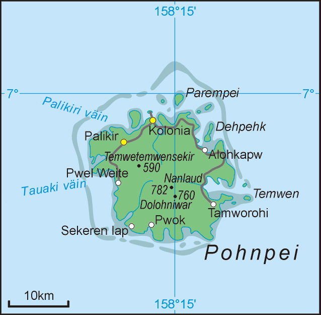 Pohnpei saar